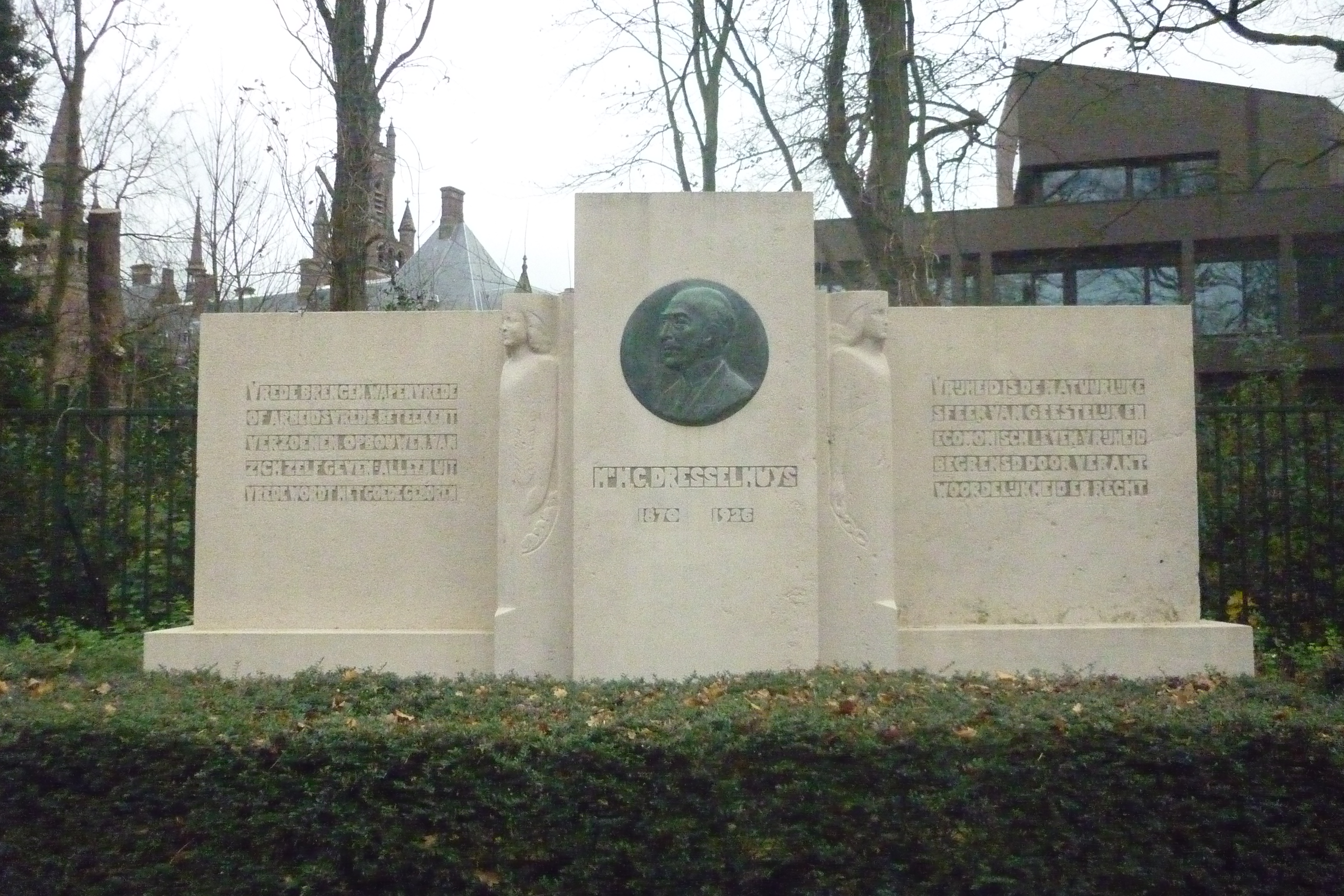 Monument van HC Dresselhuys in Den Haag